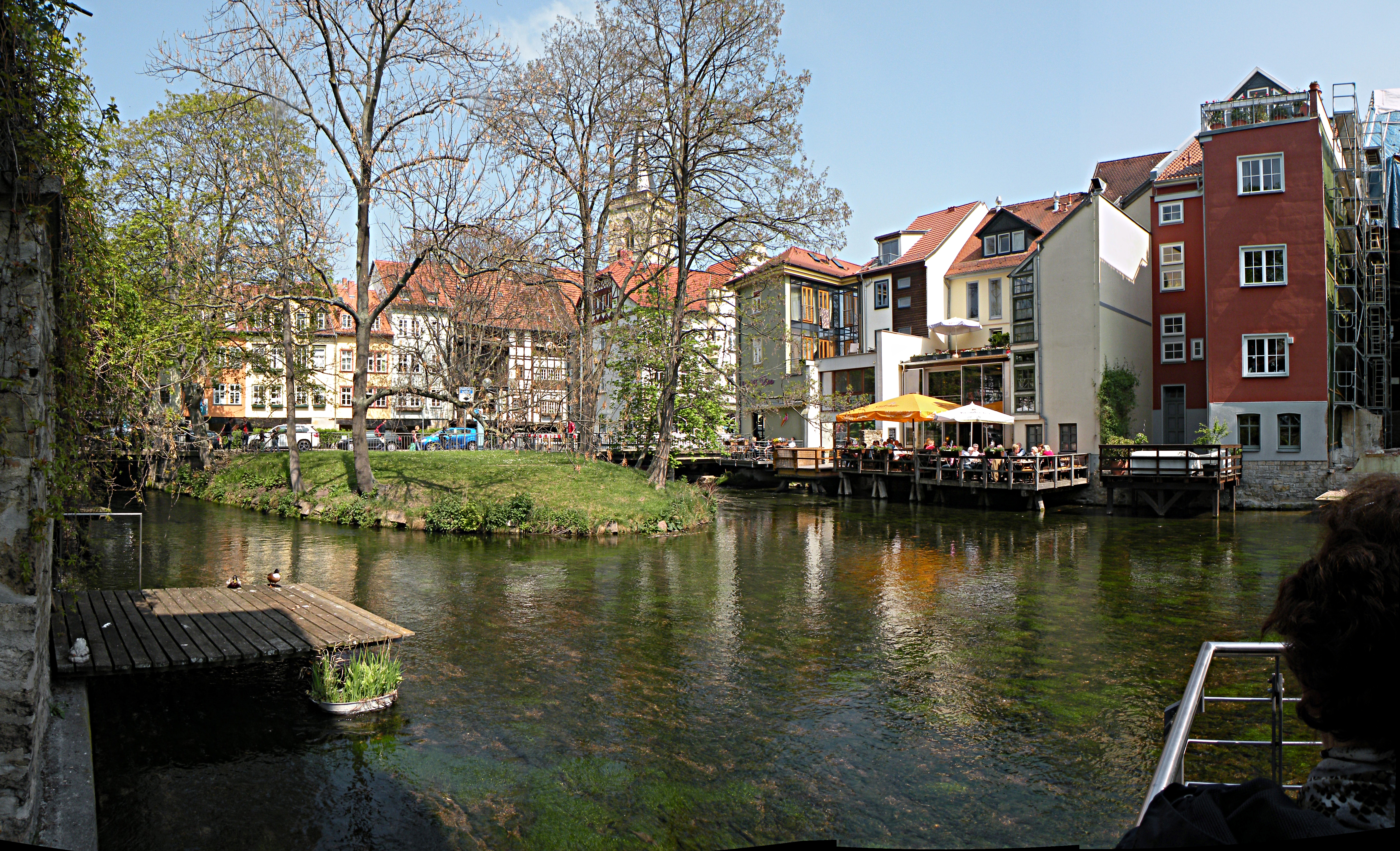 Река Гера в Эрфурте